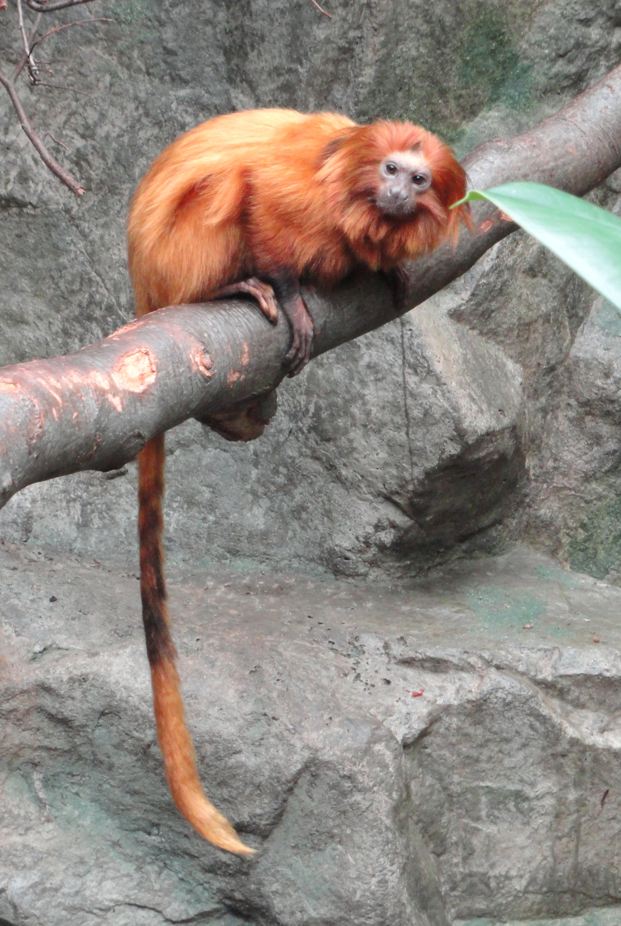 Copenhagen Zoo, Frederiksberg, Copenhagen, Denmark.